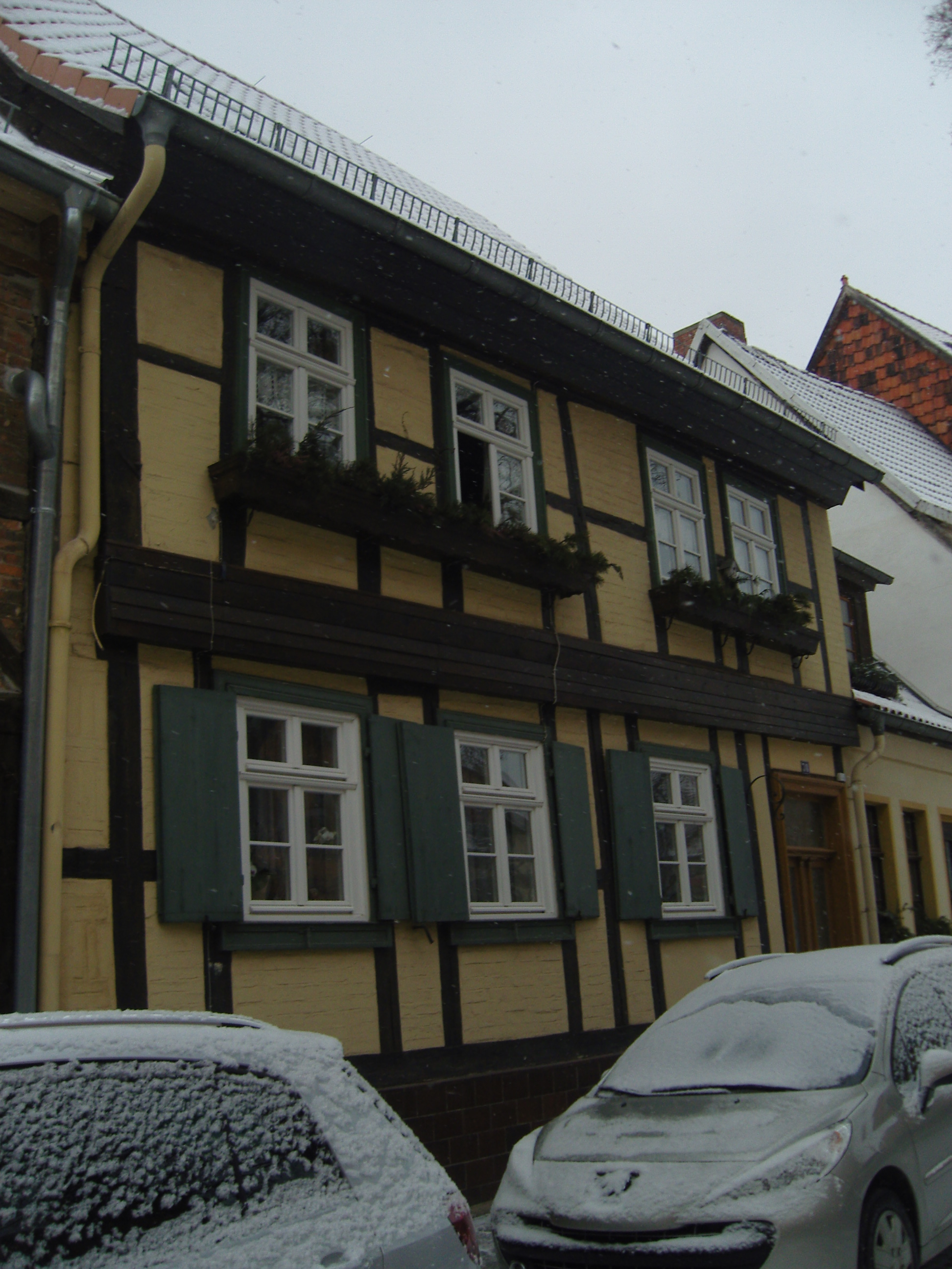 Denkmalgeschütztes Fachwerkgebäude in der Schulstraße 7 in Quedlinburg